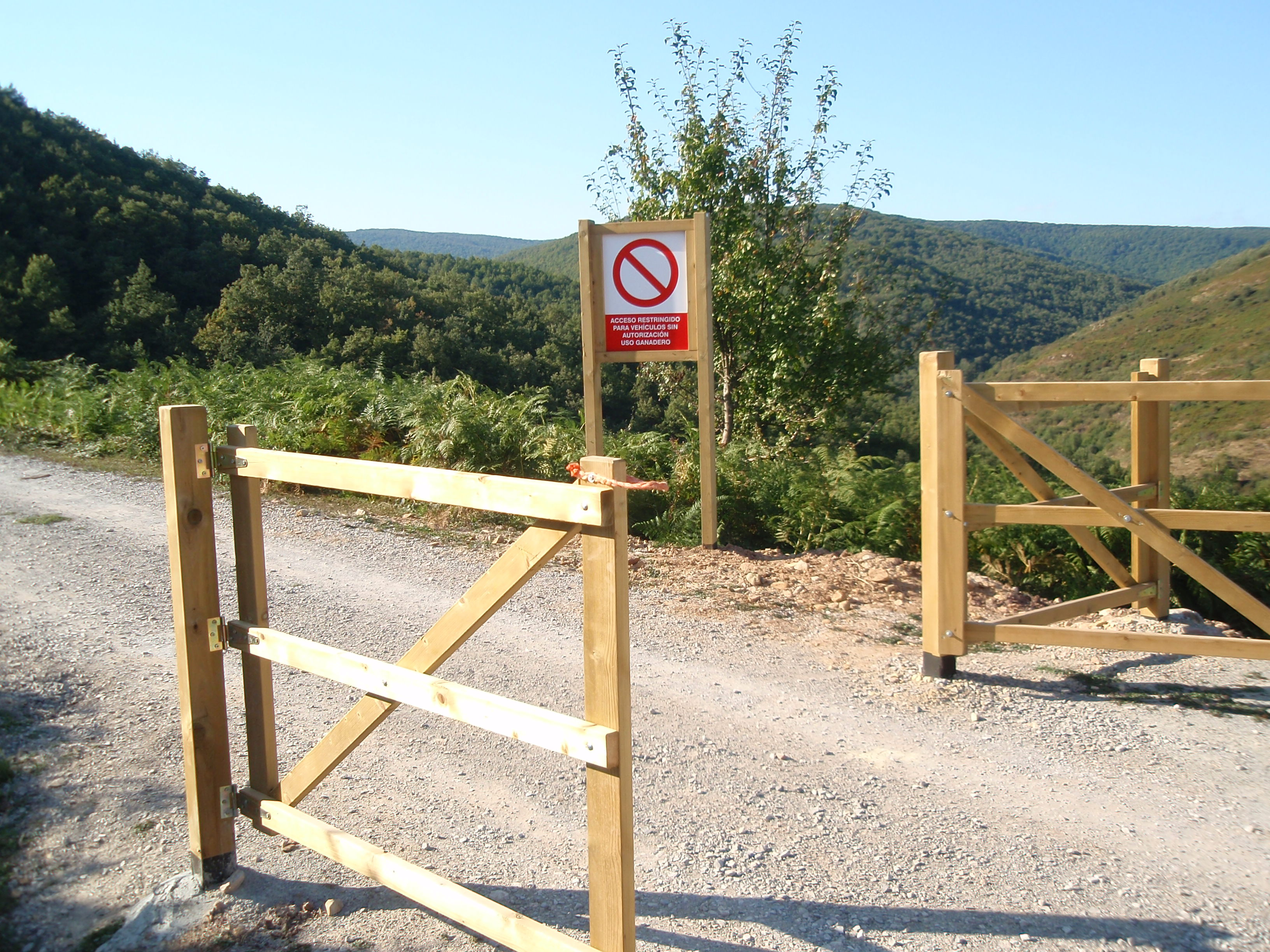 Foto del acceso a Monte Hijedo, desde Riopanero.